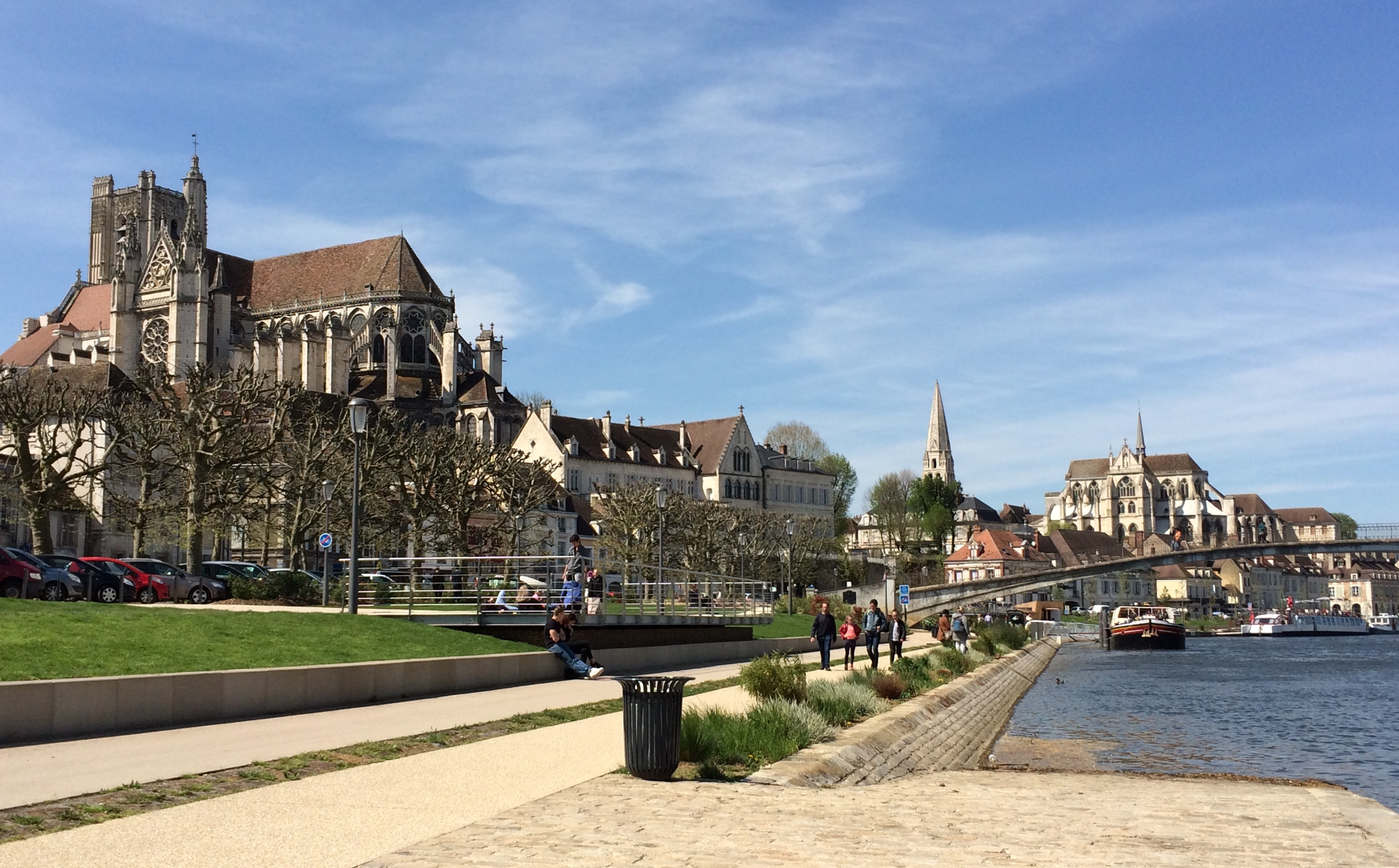 Auxerre -Catedral y Abadía